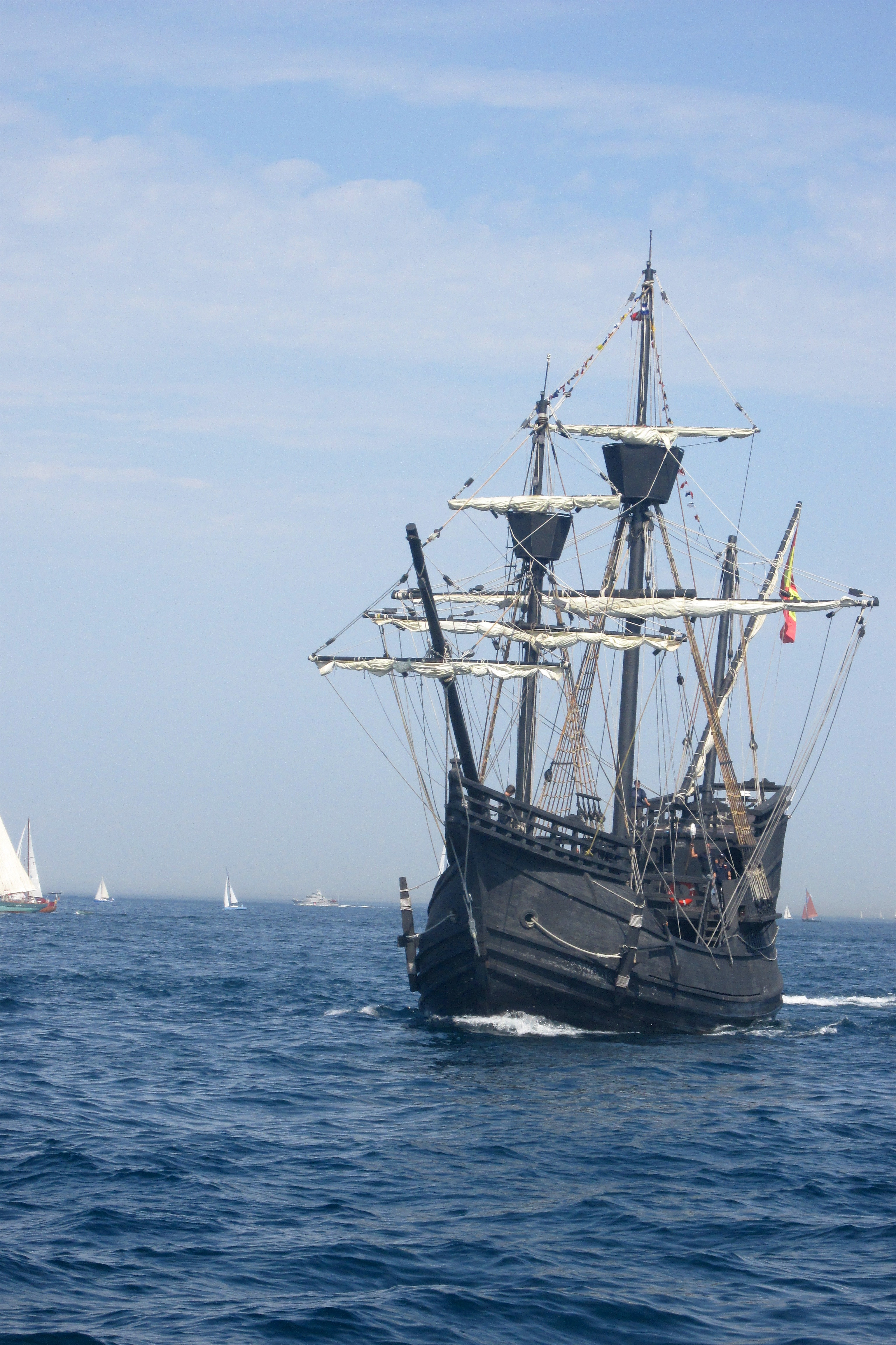 Nao Victoria